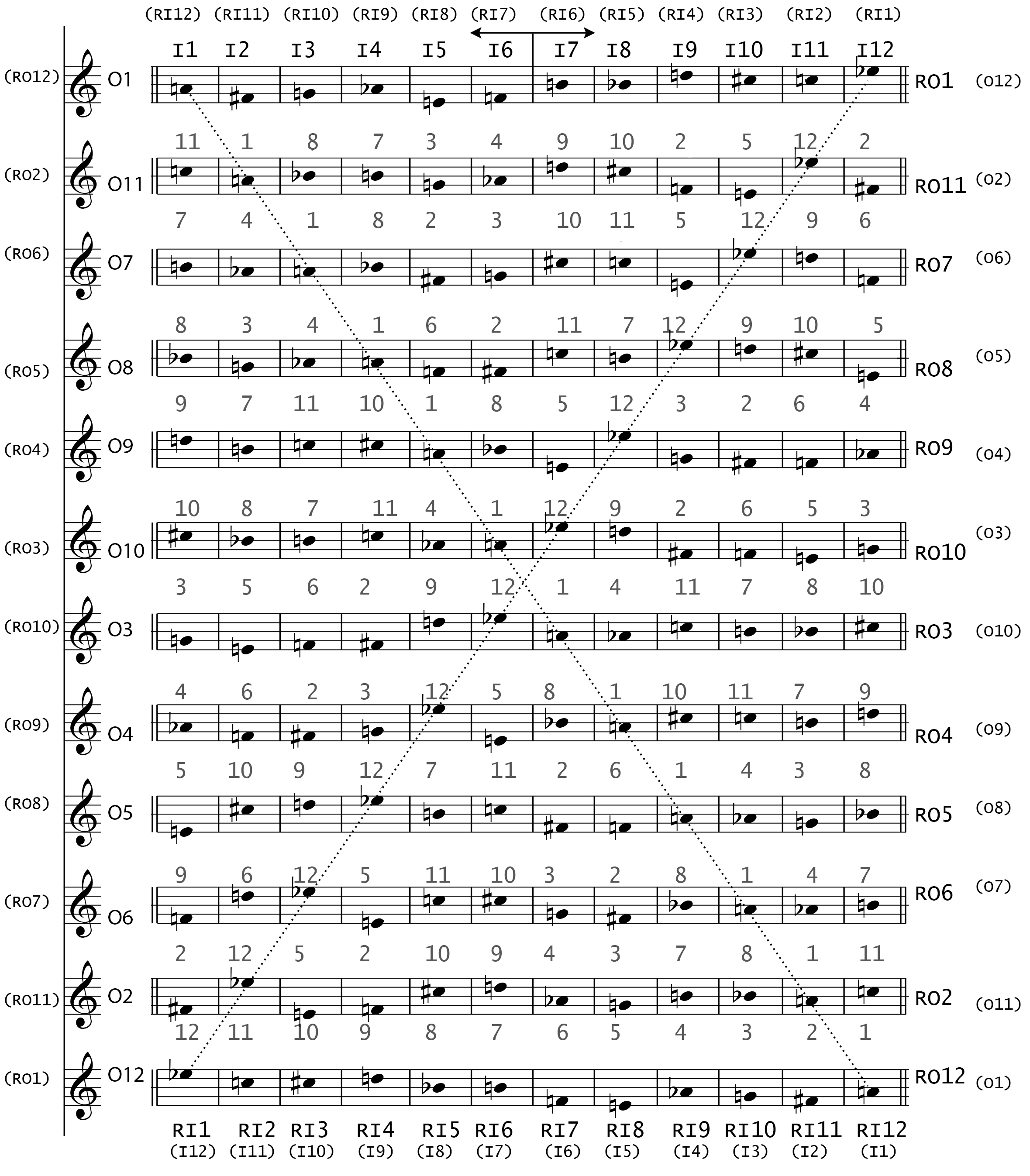 Matriz con todas las series del Opus 21 de Webern.